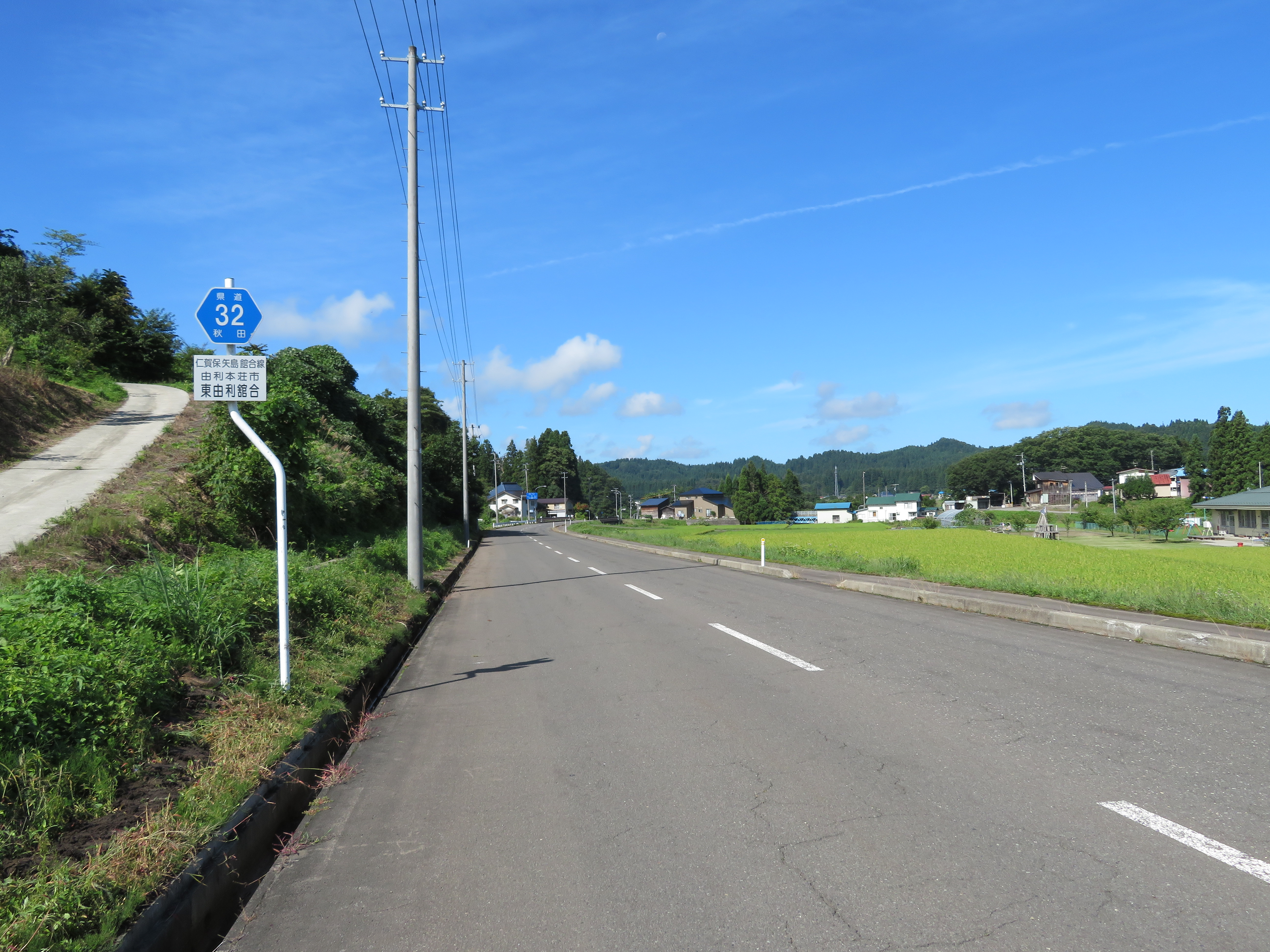 秋田県道32号線由利本荘市東由利舘合付近（矢島方面を撮影） Canon PowerShot SX720 HS